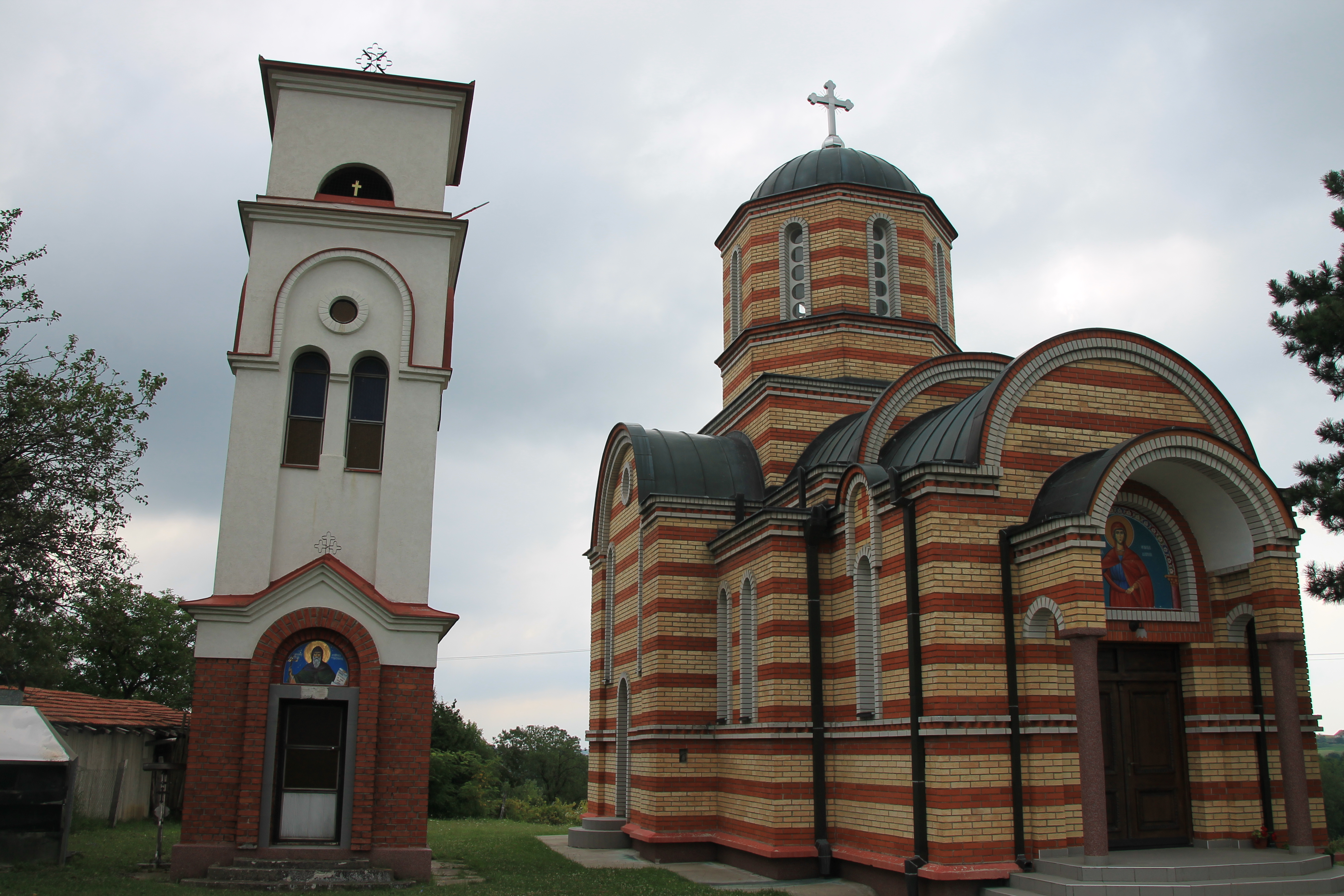 Crkva Sv. Marine (Gornja Sabanta)